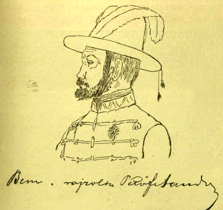 Petőfi Sándor rajza Bem Józsefről. Vasárnapi Ujság 1897/31. szám. [1]